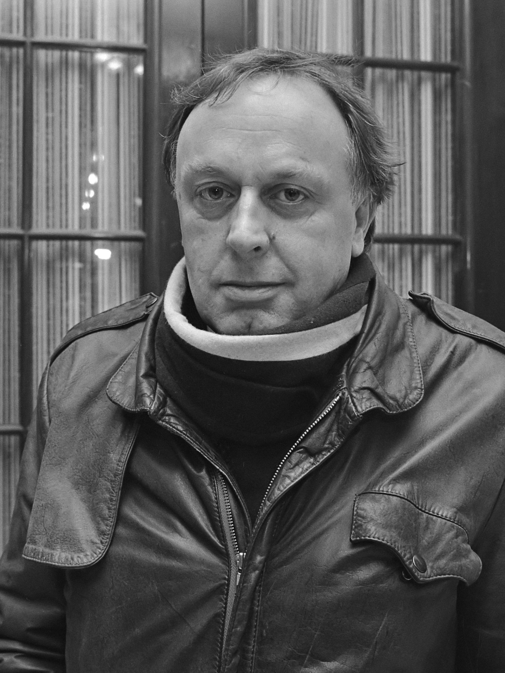 Raadscommissie voor de kunst in Amsterdam heeft gesprekken gevoerd met de 2 kandidaten voor het directeurschap van het Stedelijk Museum 10 januari 1985